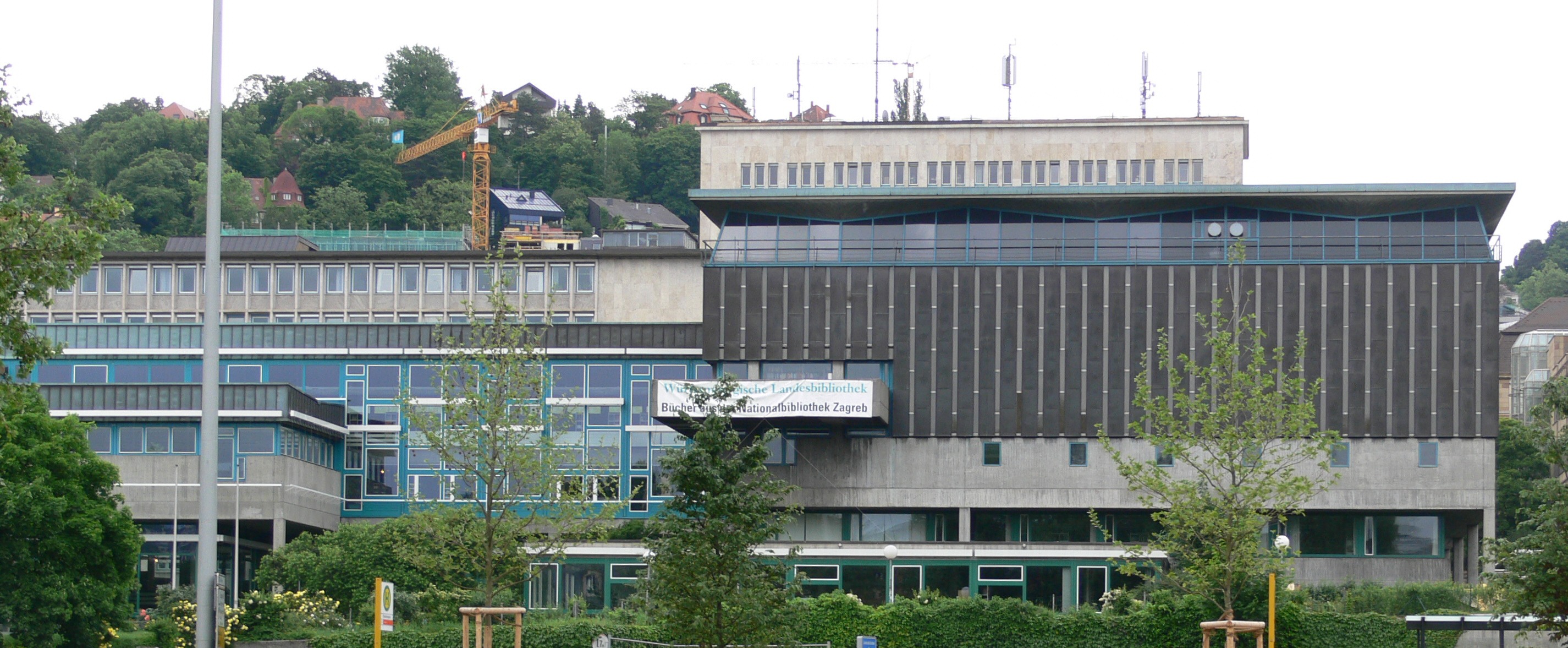 Stuttgart, Württembergische Landesbibliothek